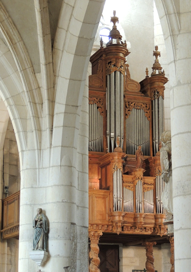 Œuvre de l'organiste et facteur d'orgue troyen Louis Le Bé (1646-1715), cet orgue initialement installé dans l'abbaye de Montiéramey (Aube) a été transféré en 1792 dans l'église Saint Jean Baptiste de Chaource (Aube). Classé monument historique depuis 1959.